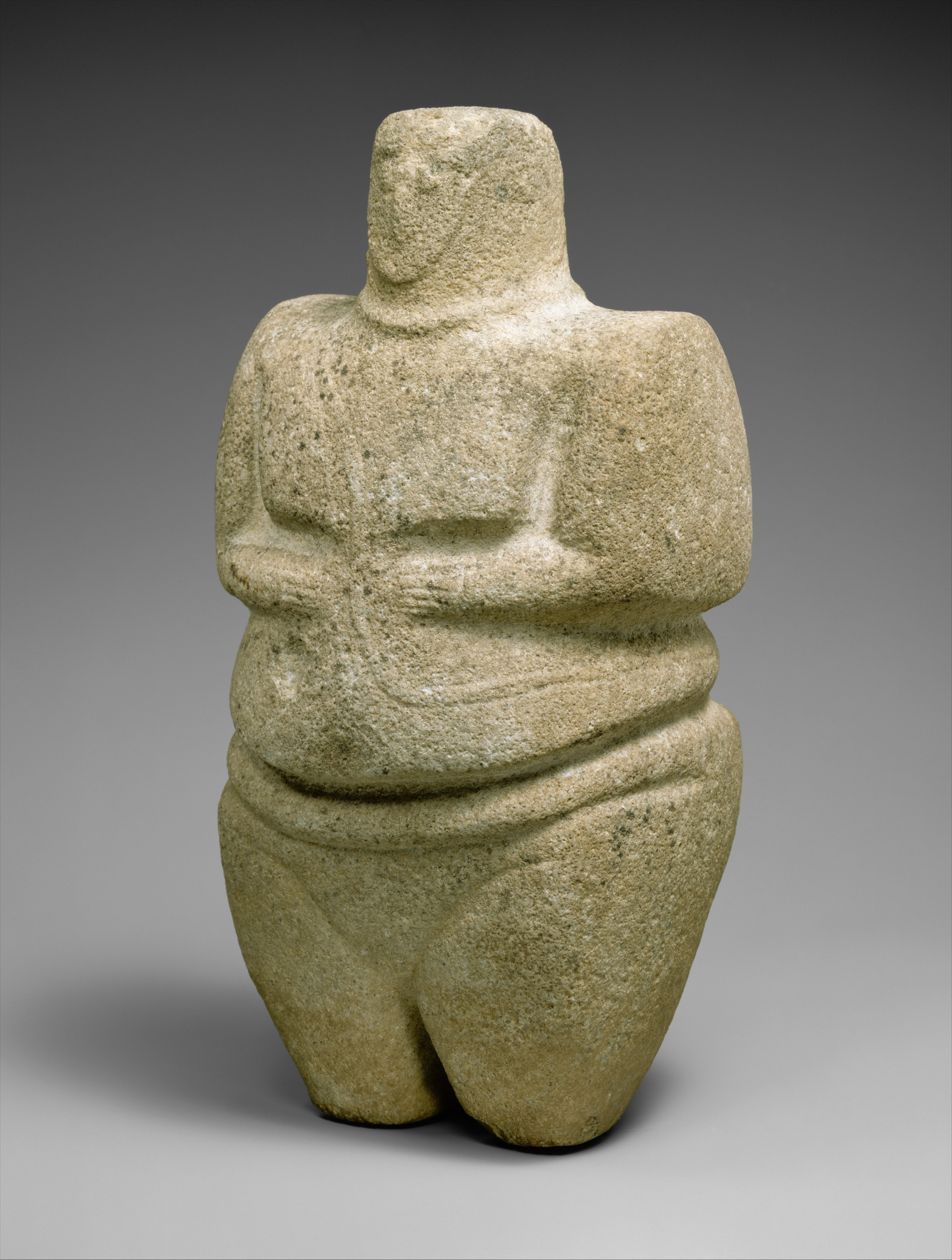 Sculpture; Stone-Sculpture